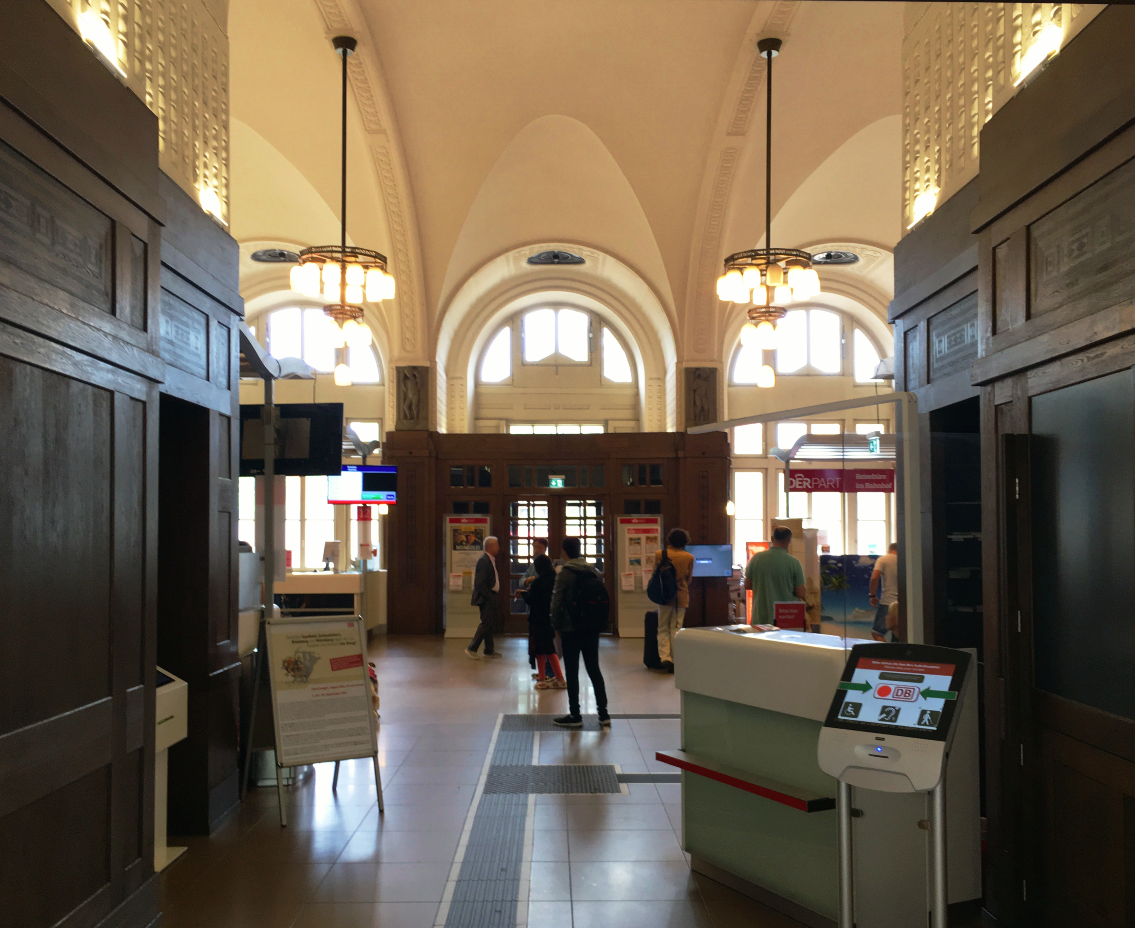 Eingang zum Jugendstilsaal im Nürnberger Hauptbahnhof.